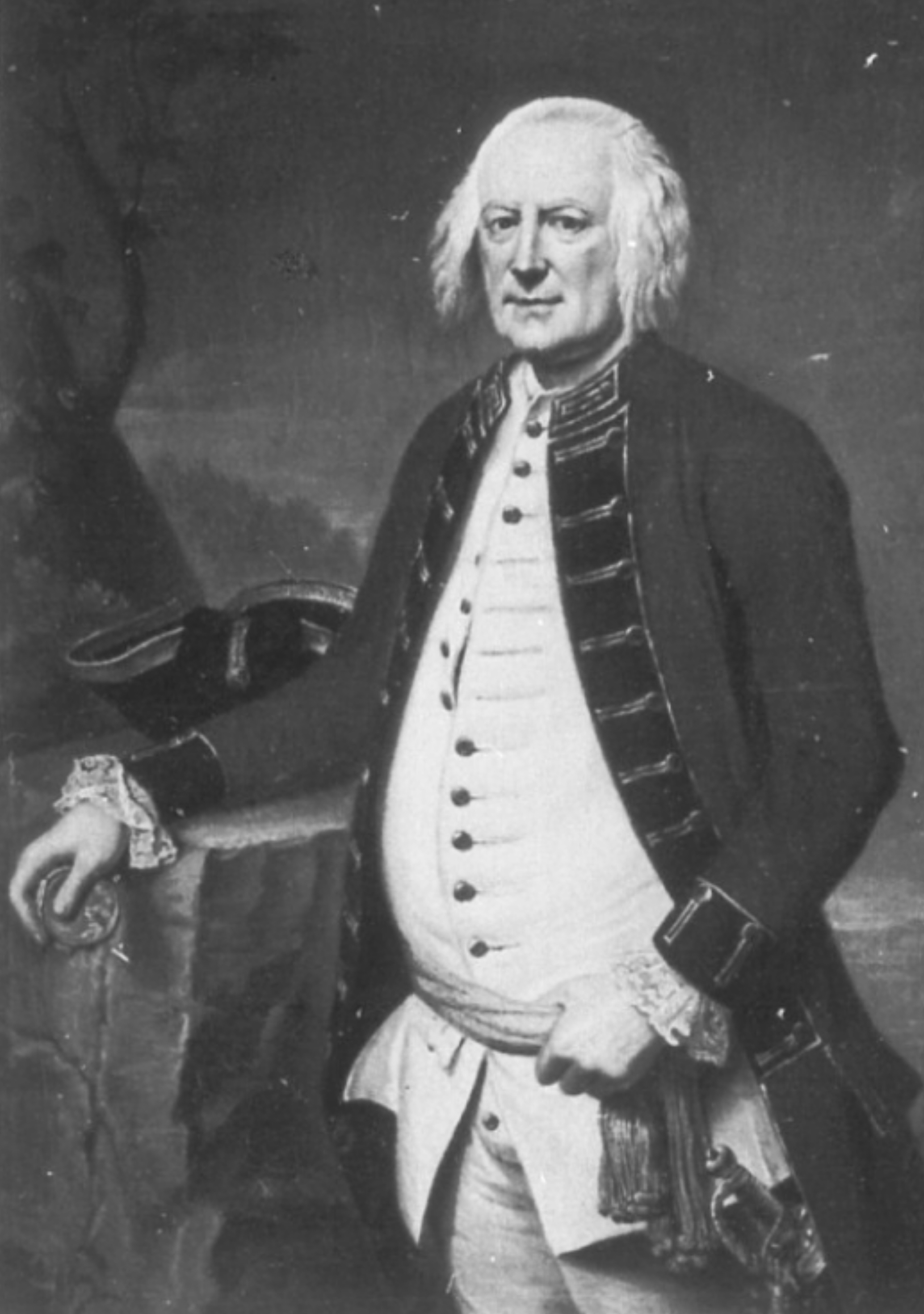 Friedrich von Spörcken (* 28. August 1698; † 13. Juni 1776), kurfürstlich braunschweig-lüneburgischer Feldmarschall